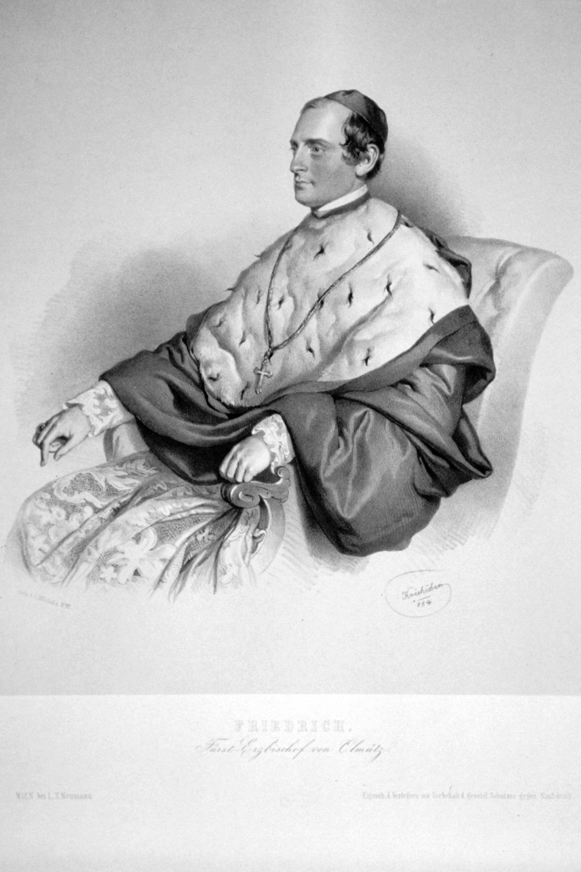 Friedrich Egon von Fürstenberg, Lithographie von Josef Kriehuber, 1854